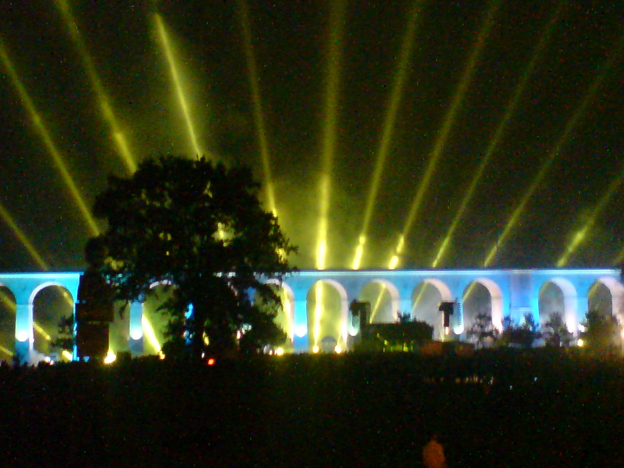 Bolesławiec - widowisko "światło i dzwięk" z okazji oddania wiaduktu po przebudownie i renowacji.